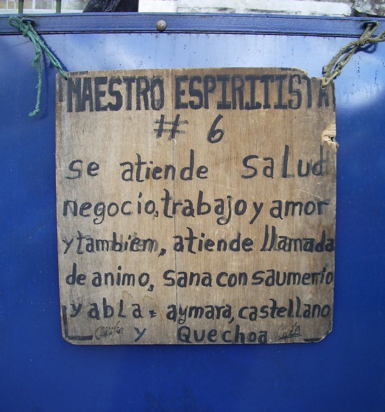 Maestro espiritista promocionándose a las puertas del cementerio de La Paz, Bolivia